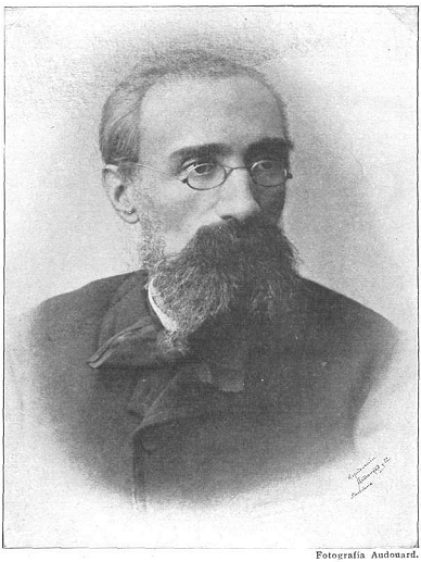 Retrato de Francesc Pelagi Briz, fotografía de Audouard recogida en la revista La Ilustració Catalana.